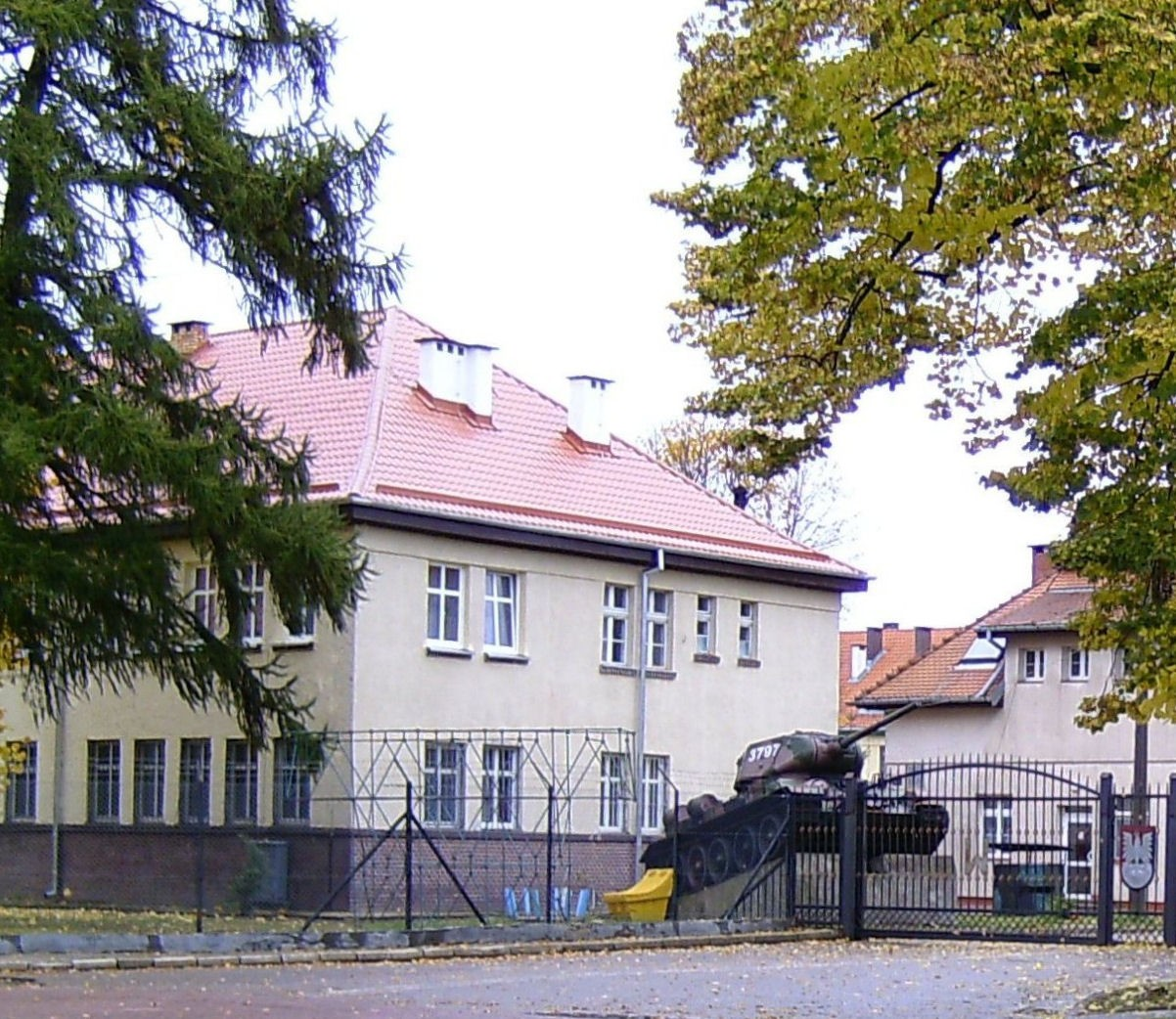 Budynek sztabu 4 Brygady Kawalerii Pancernej w Orzyszu od 1994 do 2001. W 2009 budynek sztabu das 15 BZ